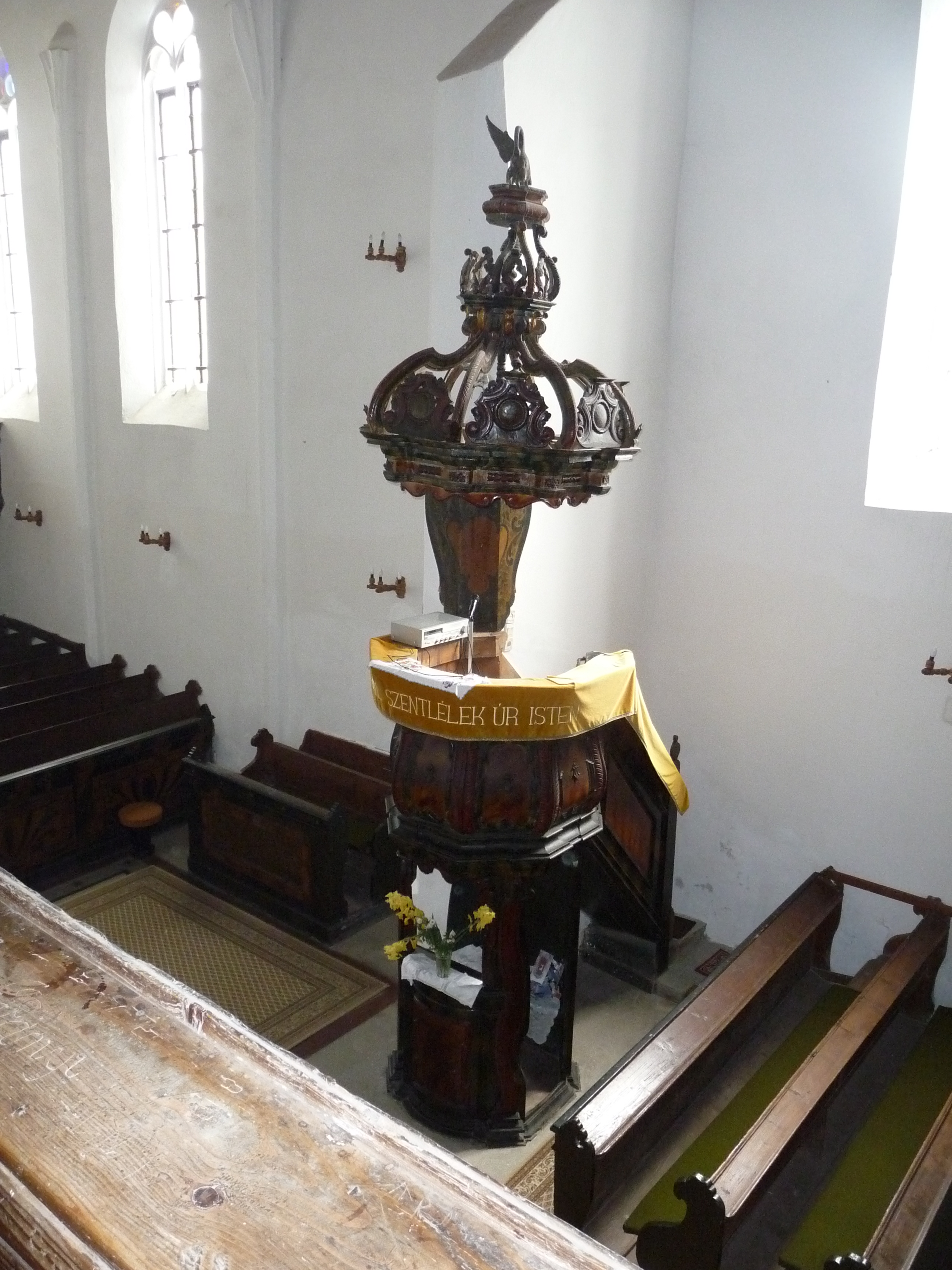 A sajószentpéteri református nagytemplom faragott szószéke